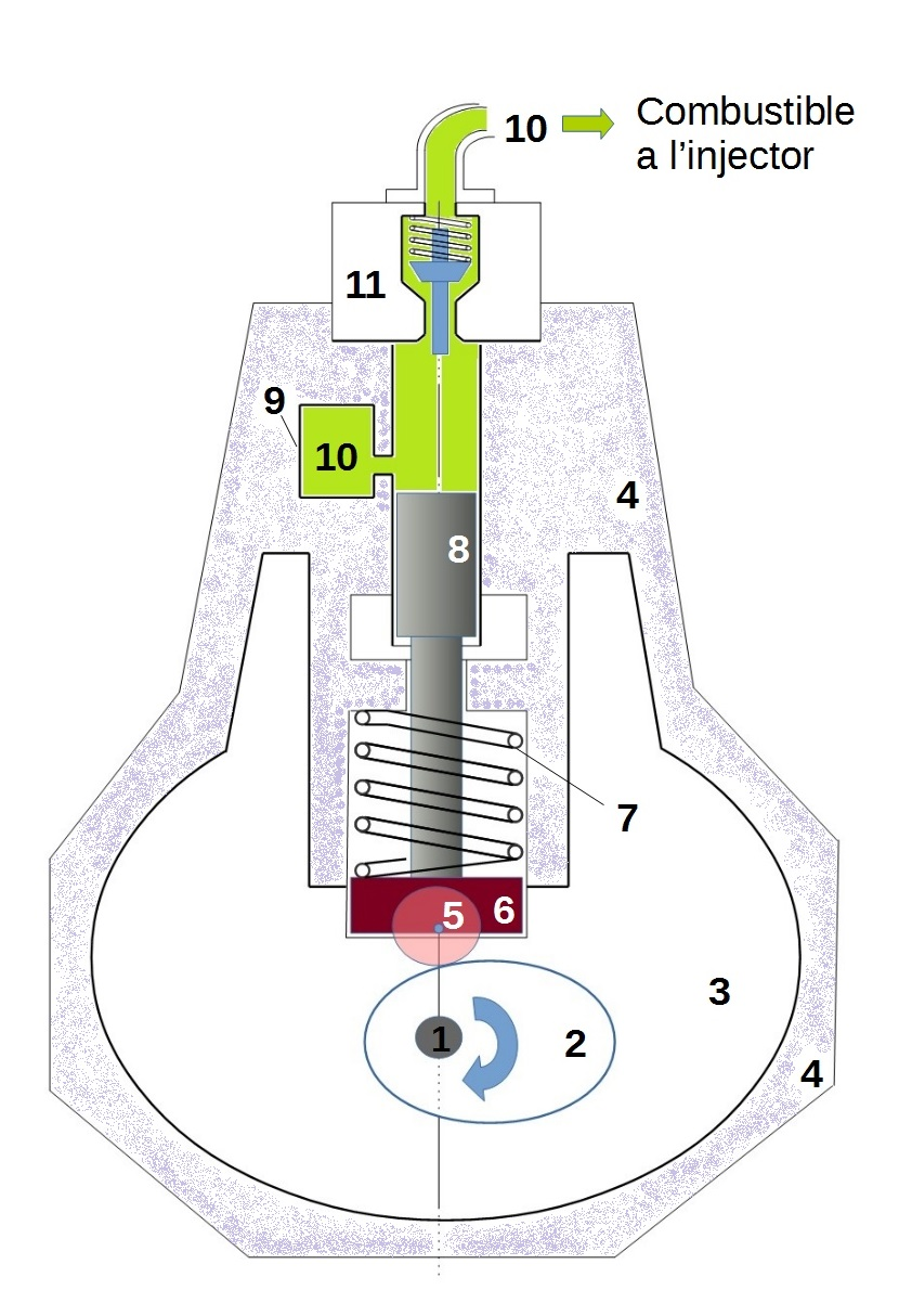 Esquema simplificat de bomba d'injecció lineal per motors dièsel